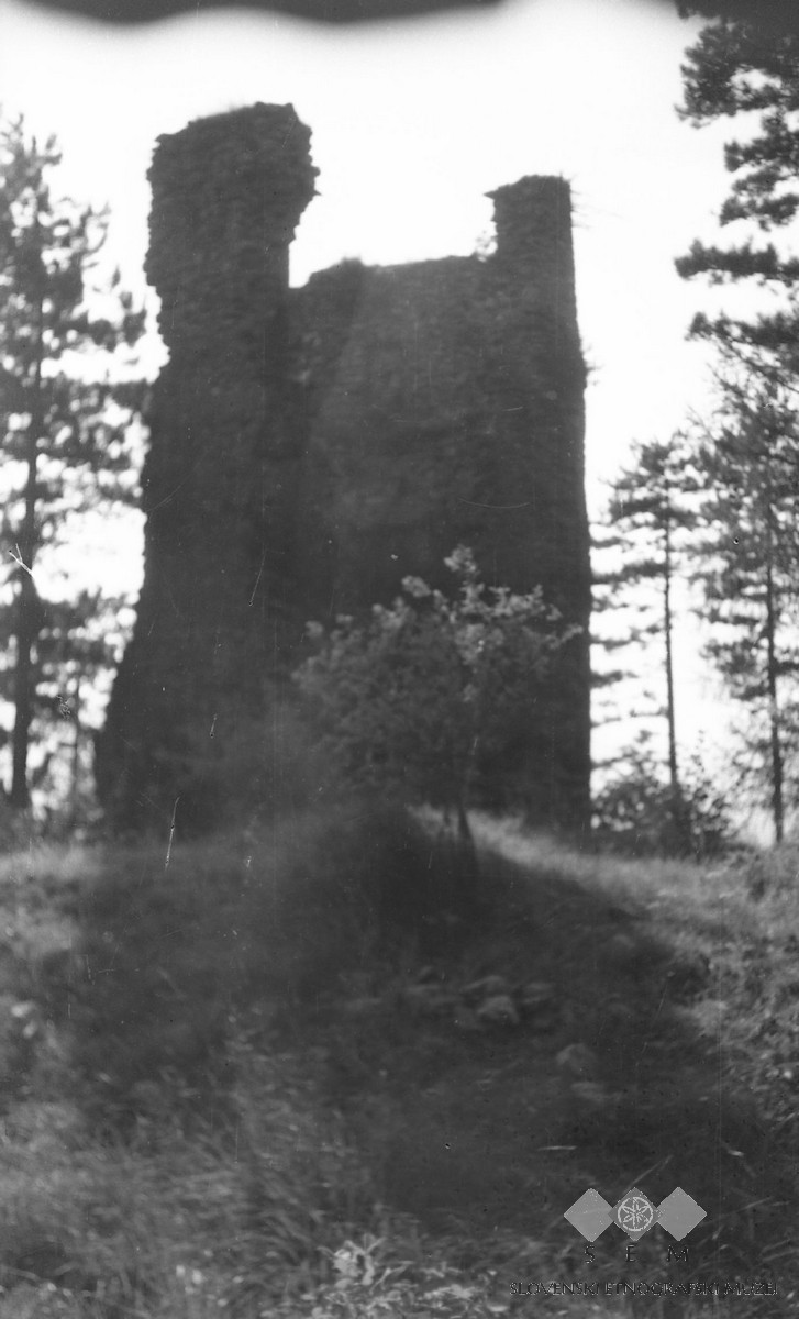 Novi grad nad Podgradom.